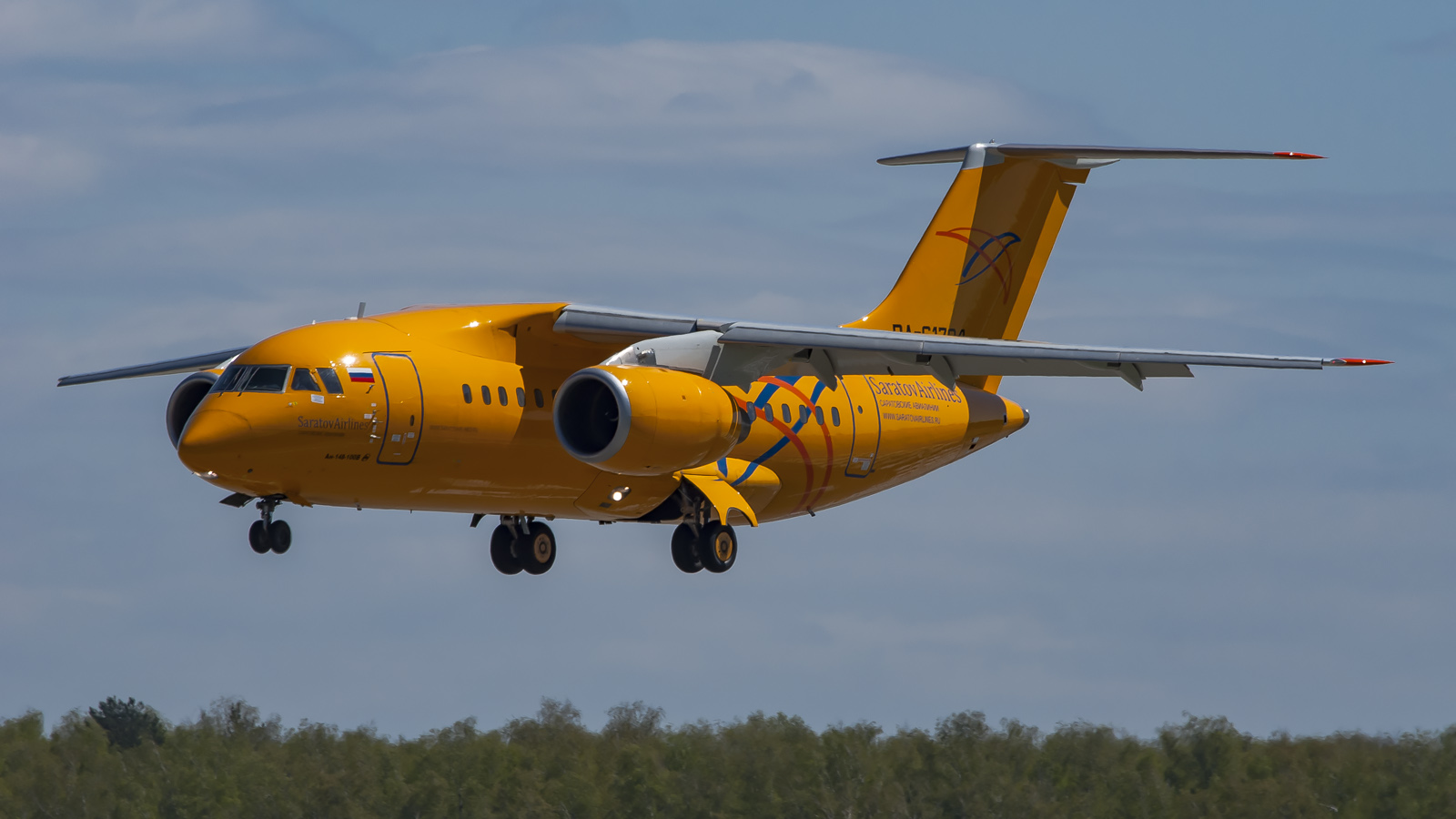 RA-61704 Antonov 148-100V Saratov Airlines DME | UUDD